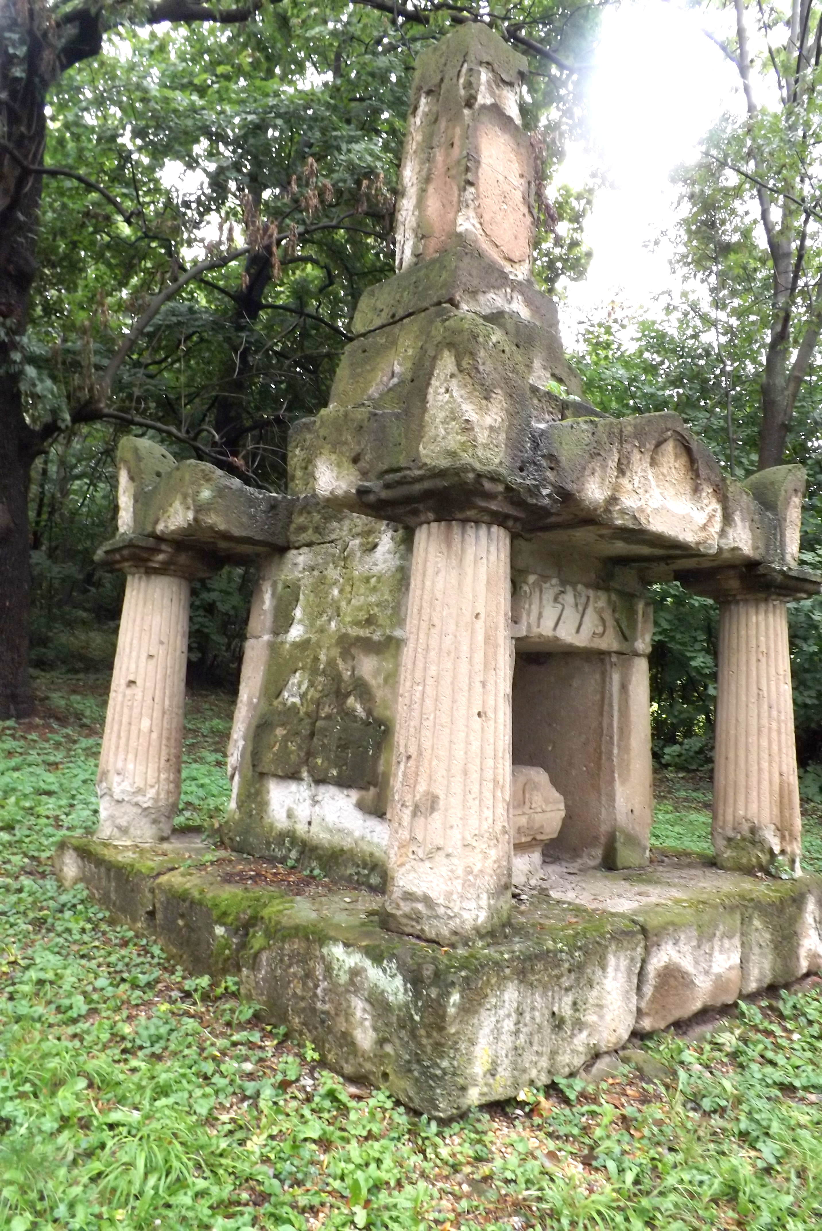 Emlékmű az Eötvös-kastély kertjében, Sály